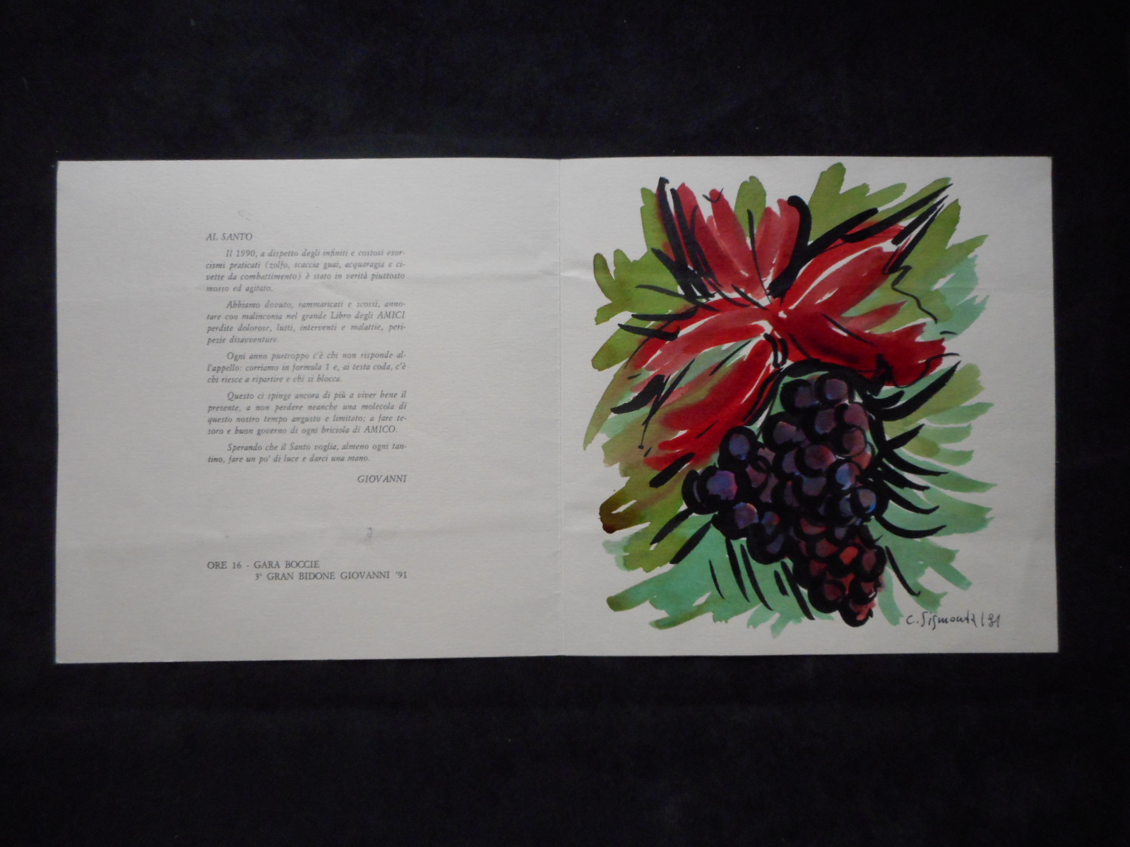 ACQUARELLO GRAPPOLO D'UVA DI Carlo Sismonda IN ONORE AD UNA GARA DI BOCCIE 1991